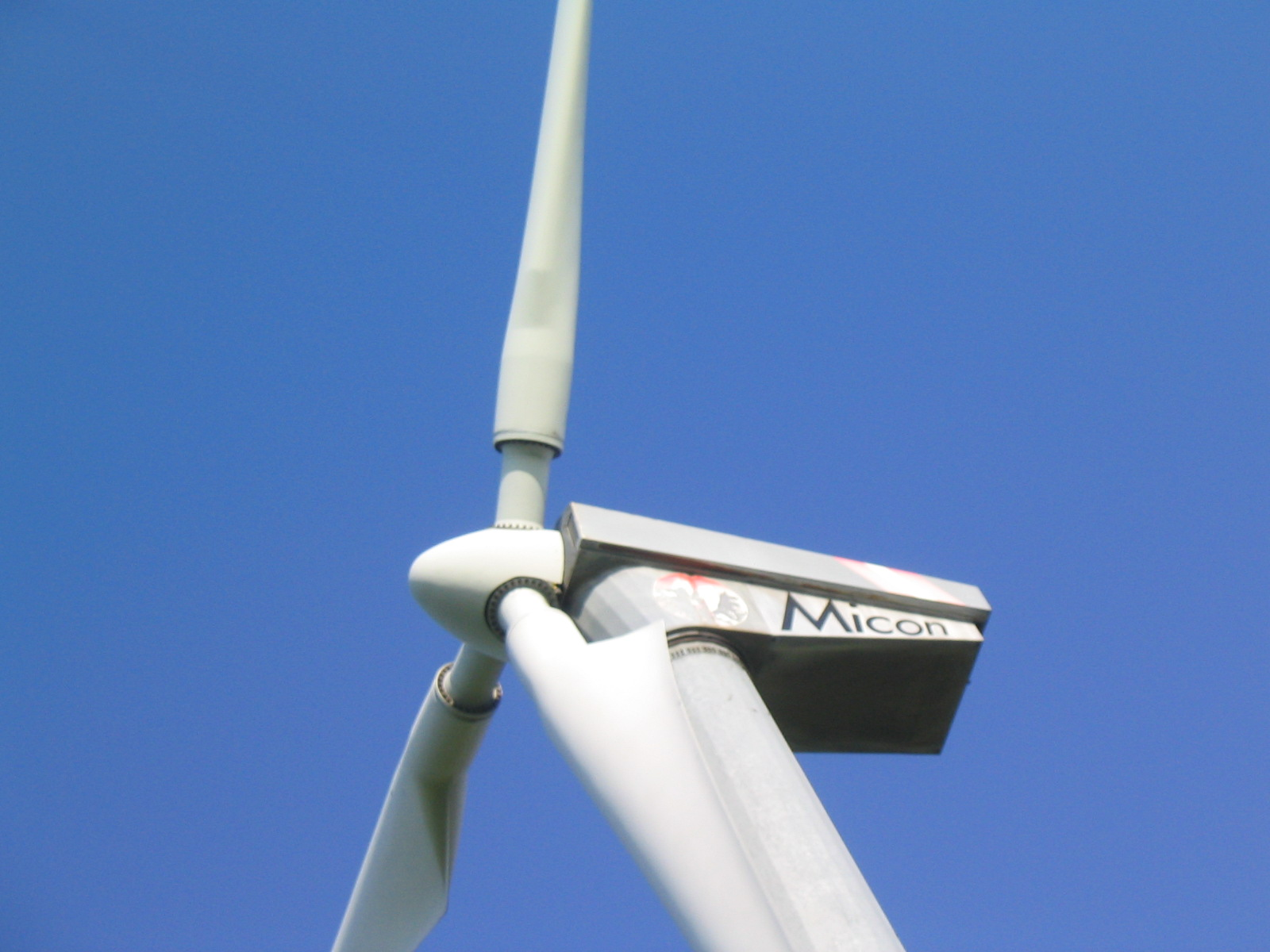 Micon wind turbine, Dithmarschen.